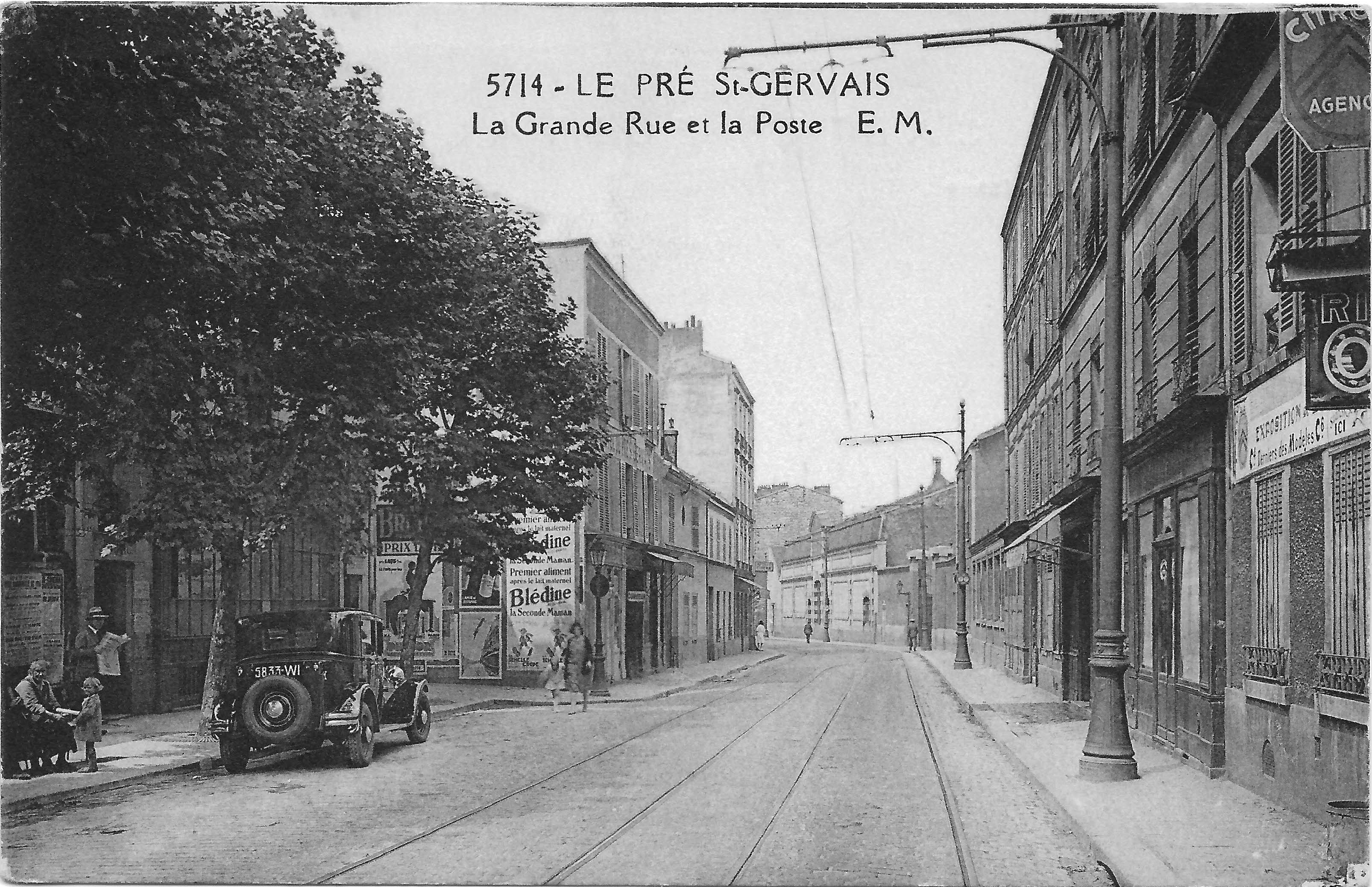 Carte postale ancienne éditée par EM, n°5714 :LE PRE ST-GERVAIS - La Grande Rue et la Poste